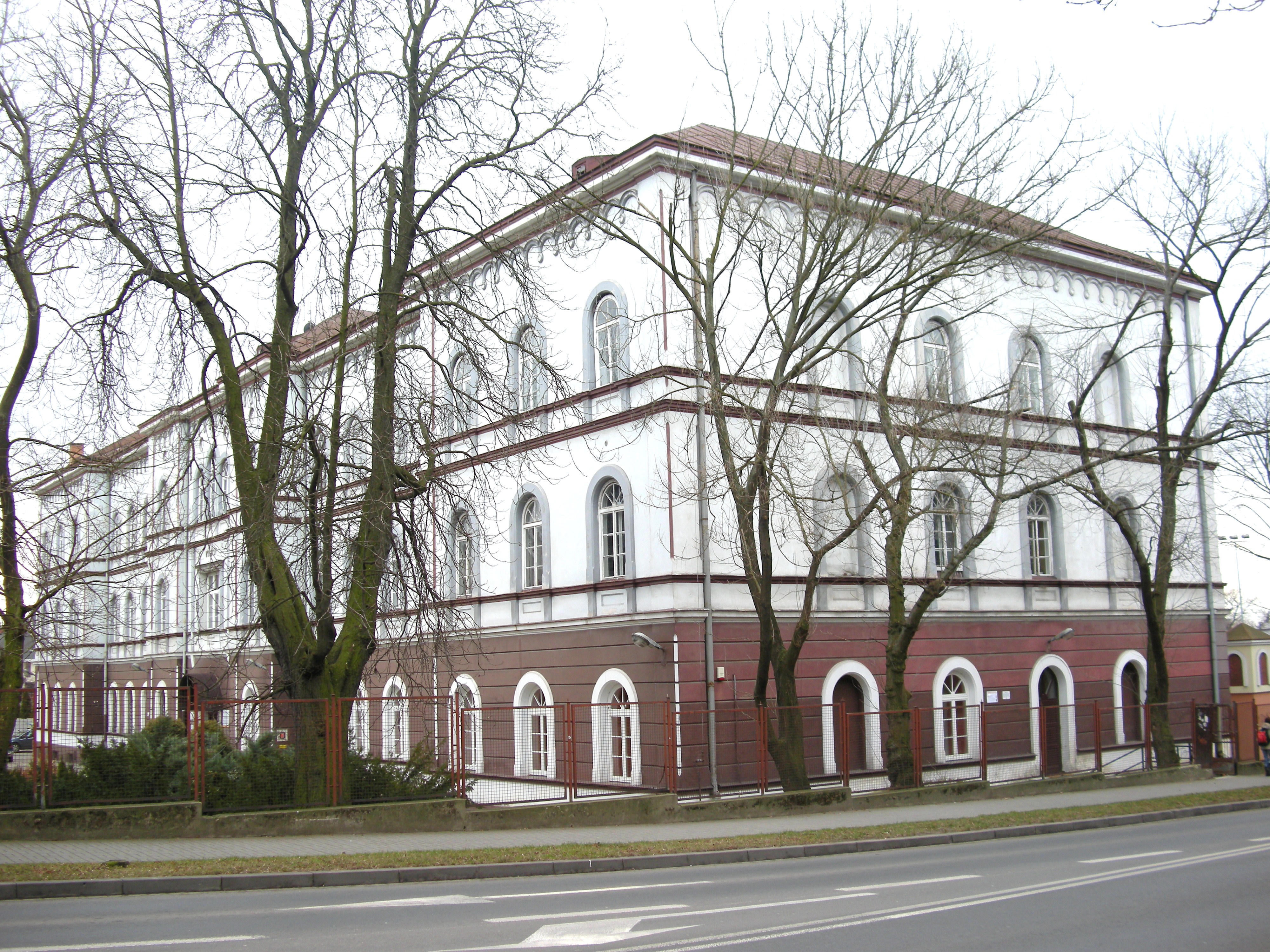 Zakład wychowania wojskowego z 1855 r. pełniący później także funkcję szpitala wojskowego. Obecnie Pałac Młodzieży